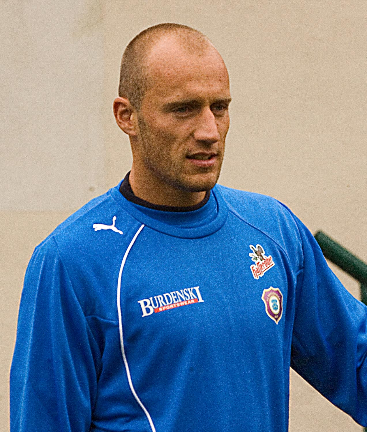 Sebastian Glasner